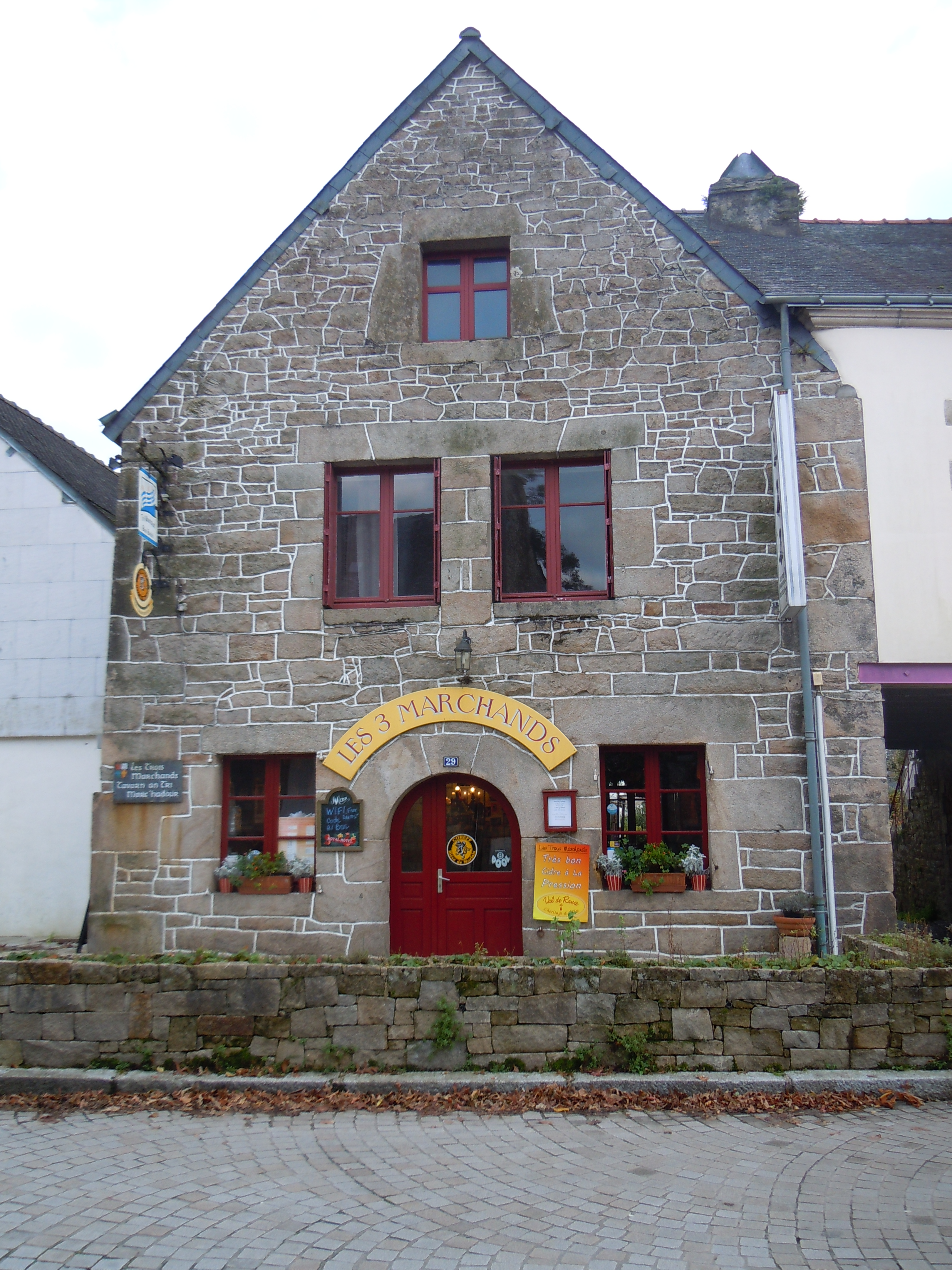 la taverne des trois marchands ( commune de Guémené-sur-Scorff, département du Morbihan)